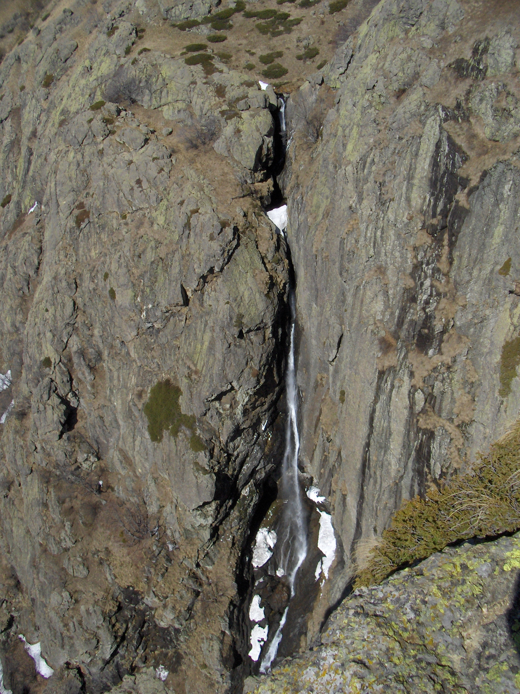 Снимка на Бабско пръскало, направена от Митака през март 2008г.